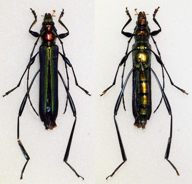 Dohrn, 1876 Sex: ? Data: 10-2012 - Mount Kloto - Togo Size: ?